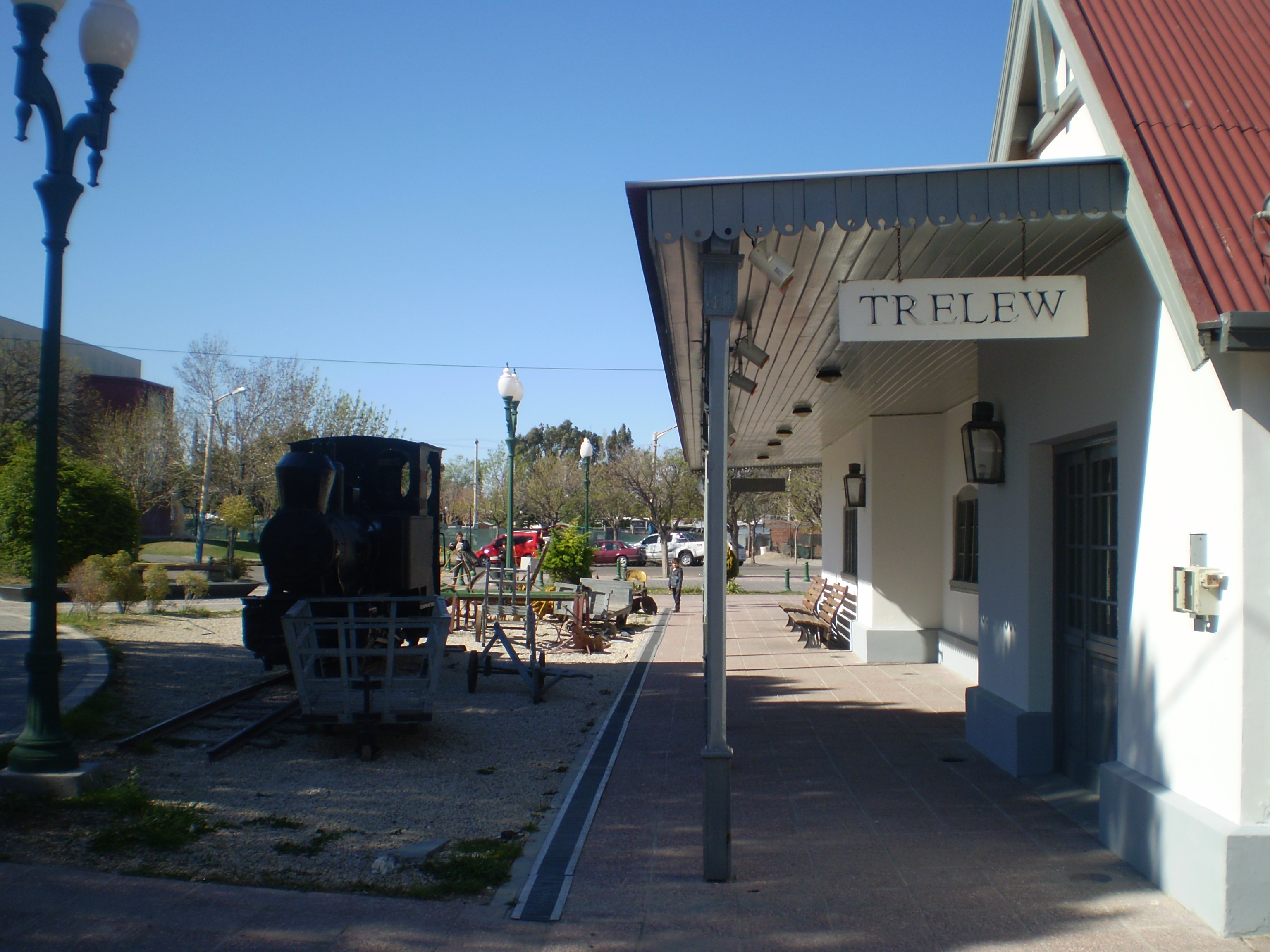 Ex Estación ferroviaria de Trelew. Parte trasera III. Hoy Museo Pueblo de Luis.